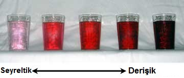 Seyreltikten derişiğe